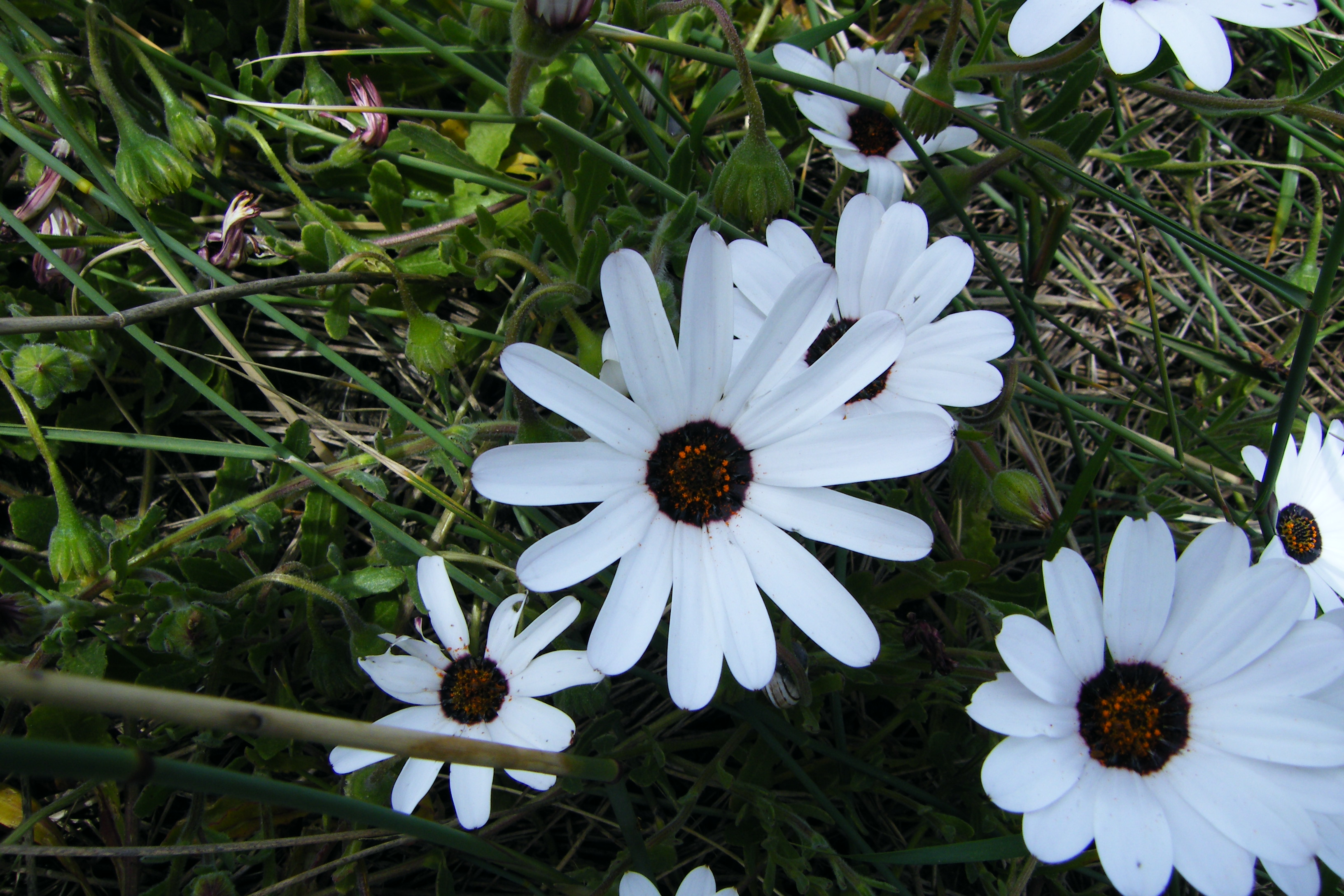 reenblommetjies